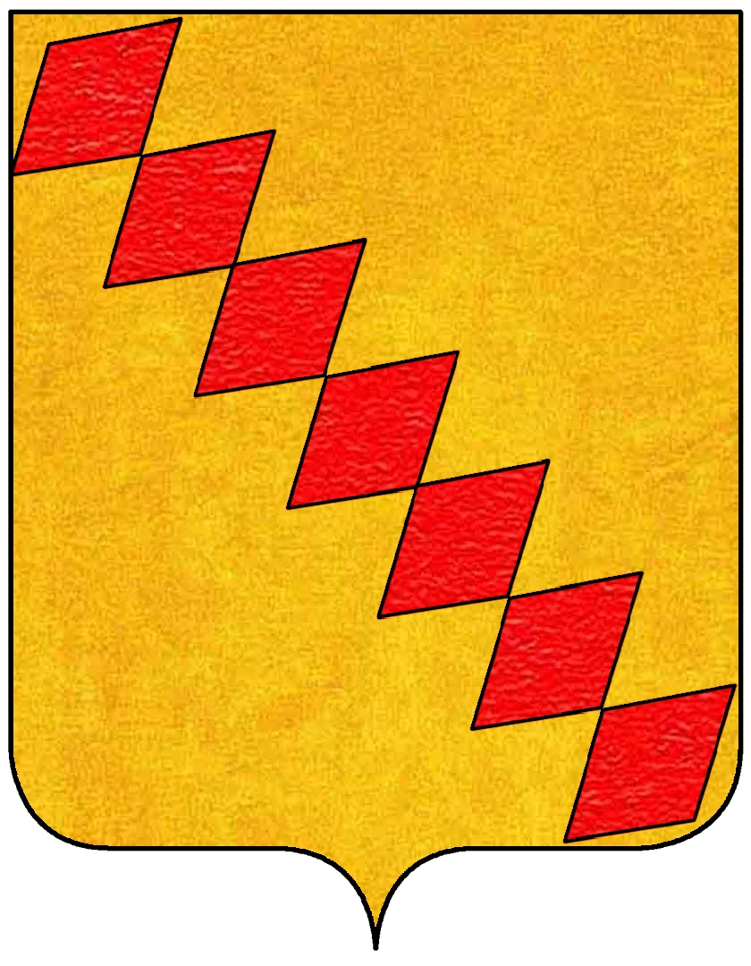 Stemma della famiglia Bardi